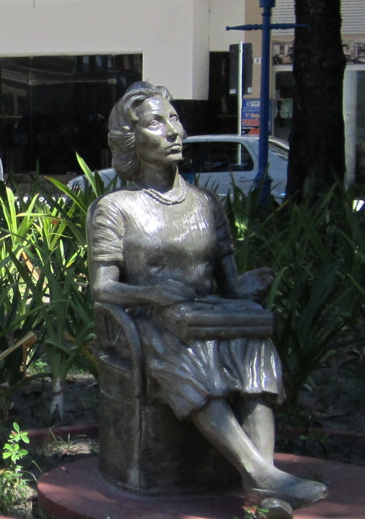 Estátua de Clarice Lispector - Praça Maciel Pinheiro - Recife, Pernambuco, Brasil.